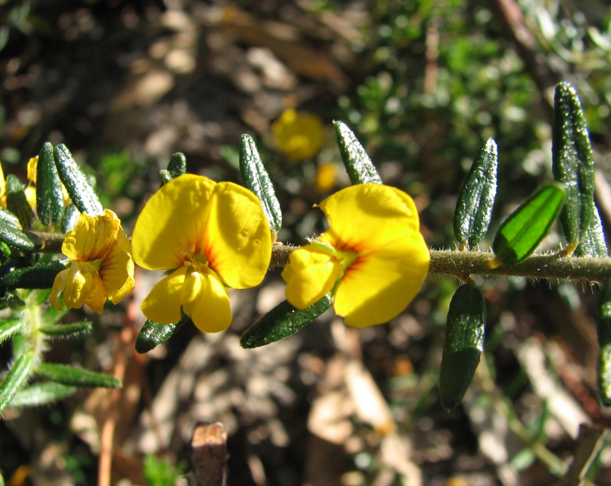 Aotus ericoides Clayton, Victoria, Australia